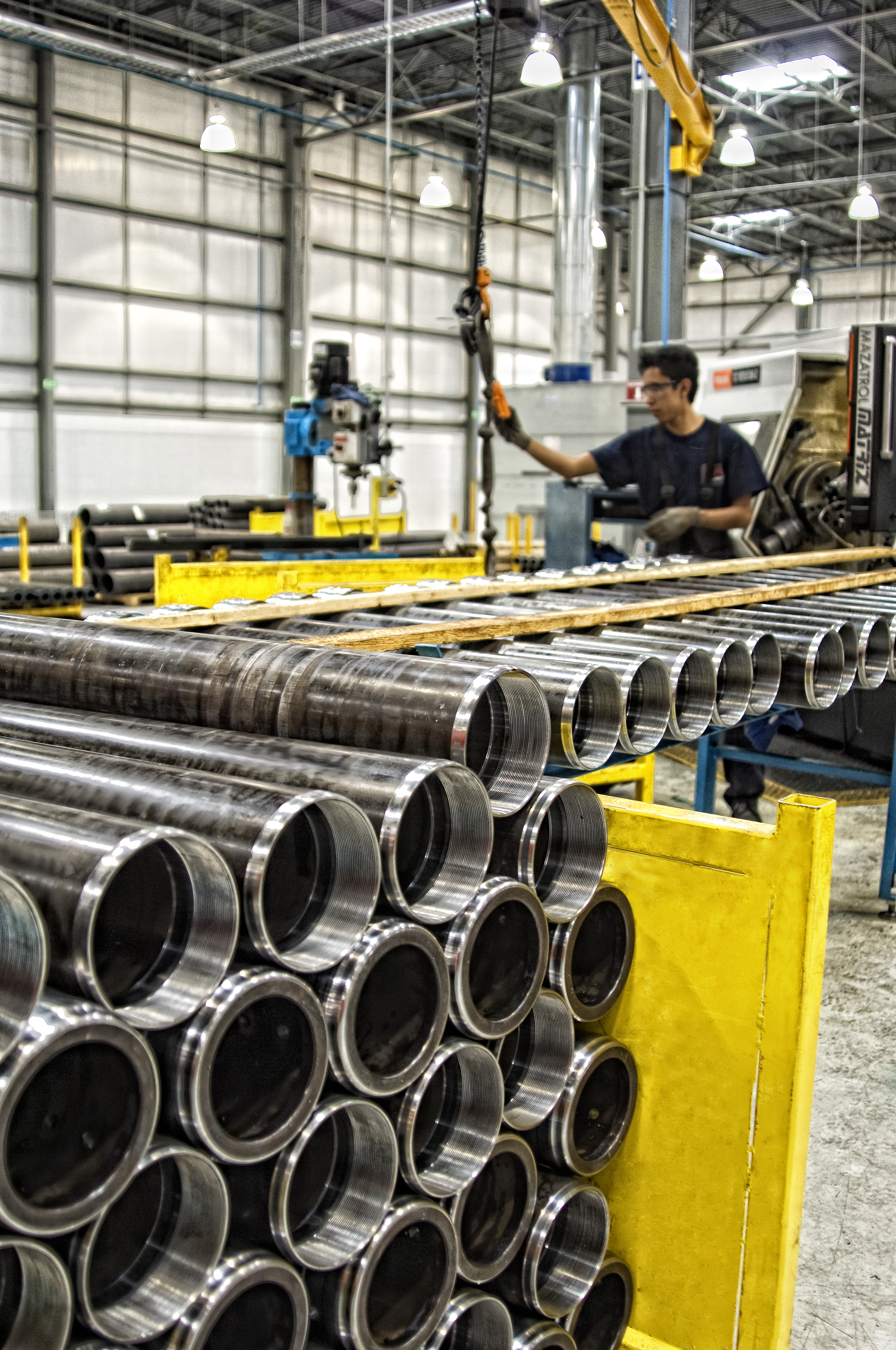 Una de las empresas dentro de GTO Puerto Interior.